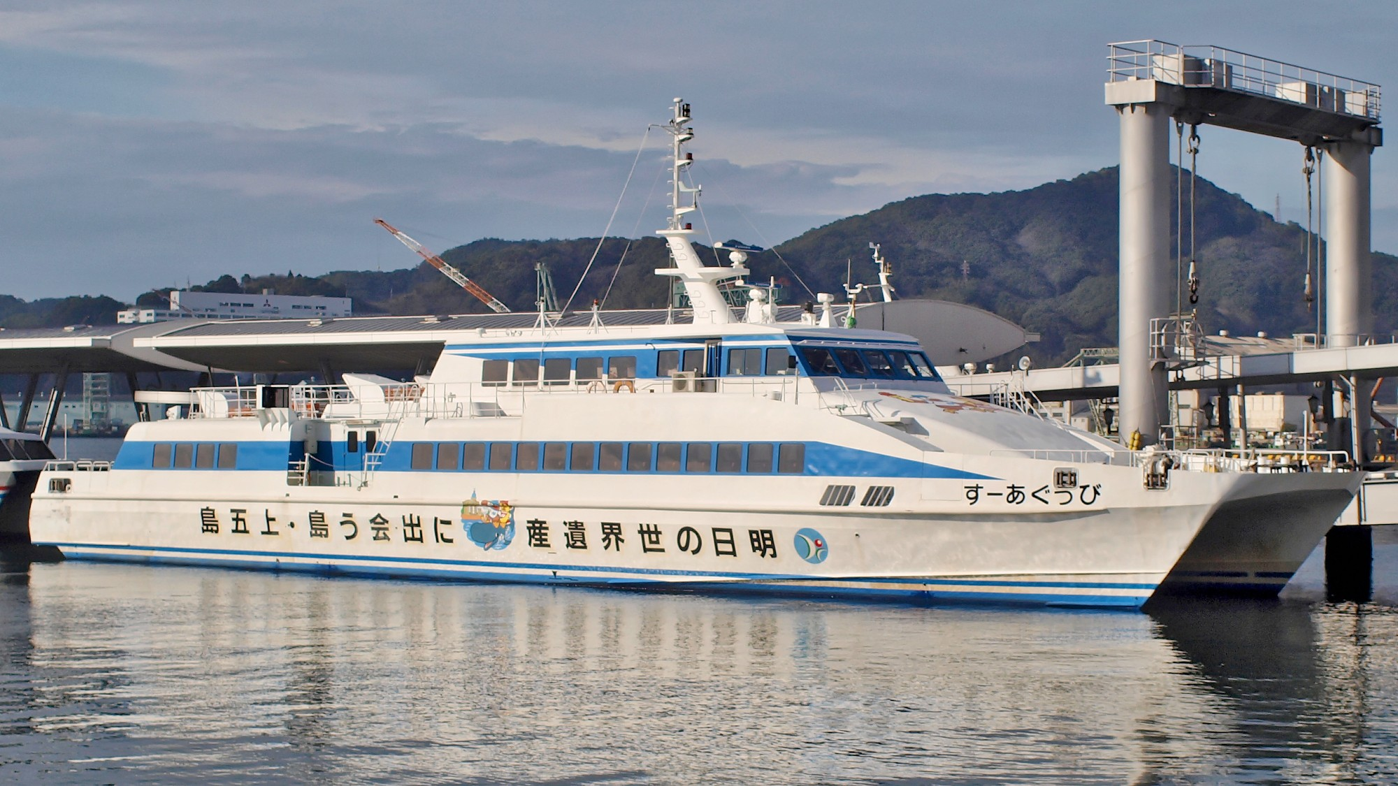 長崎港に停泊中の五島産業汽船の高速船「びっぐあーす」。三井造船の半没型高速艇、三井スーパーマラン・CP-30型。